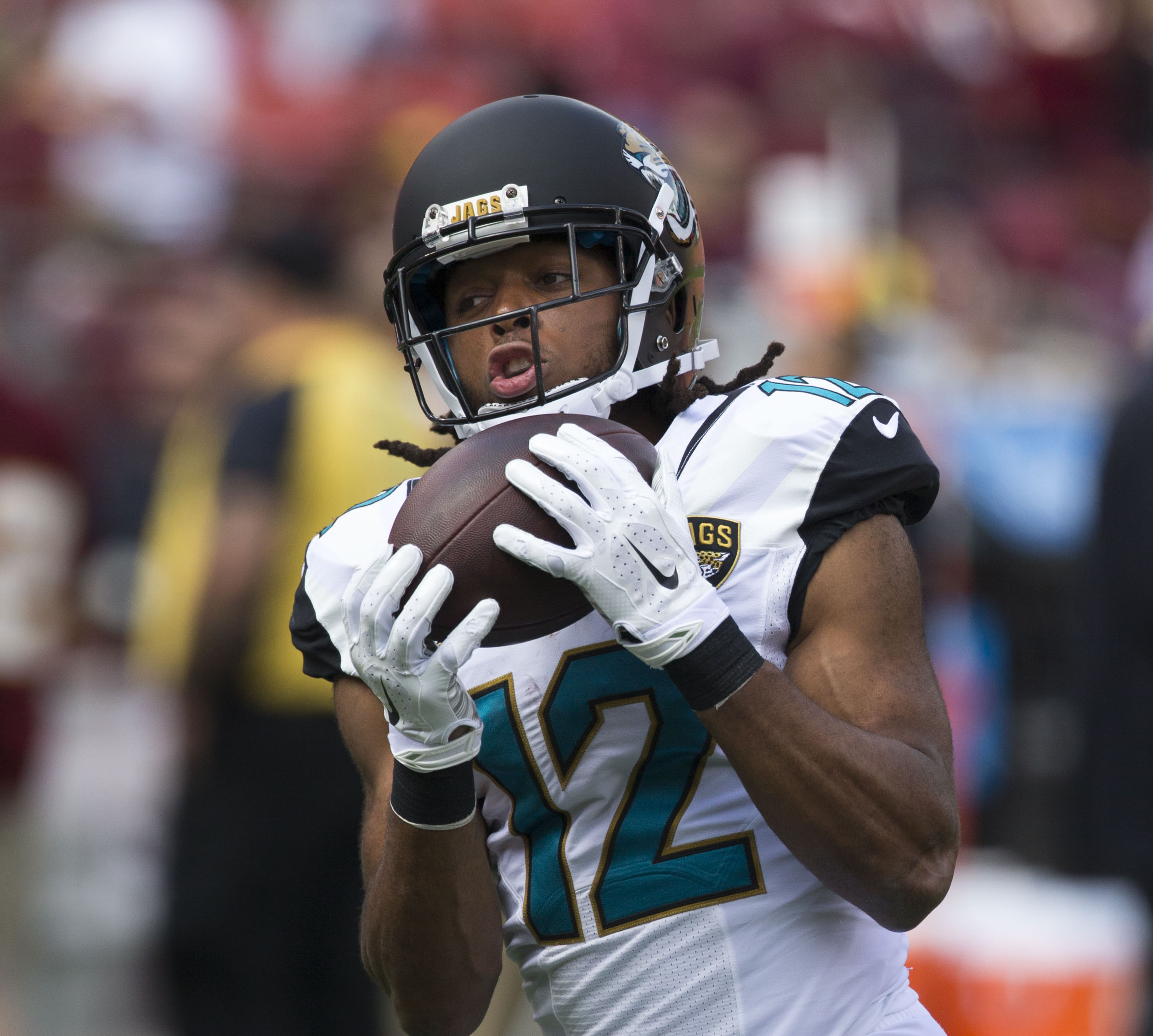 Jaguars at Redskins 9/14/14